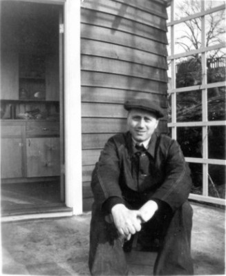 ქართველი იურისტი, ემიგრანტი